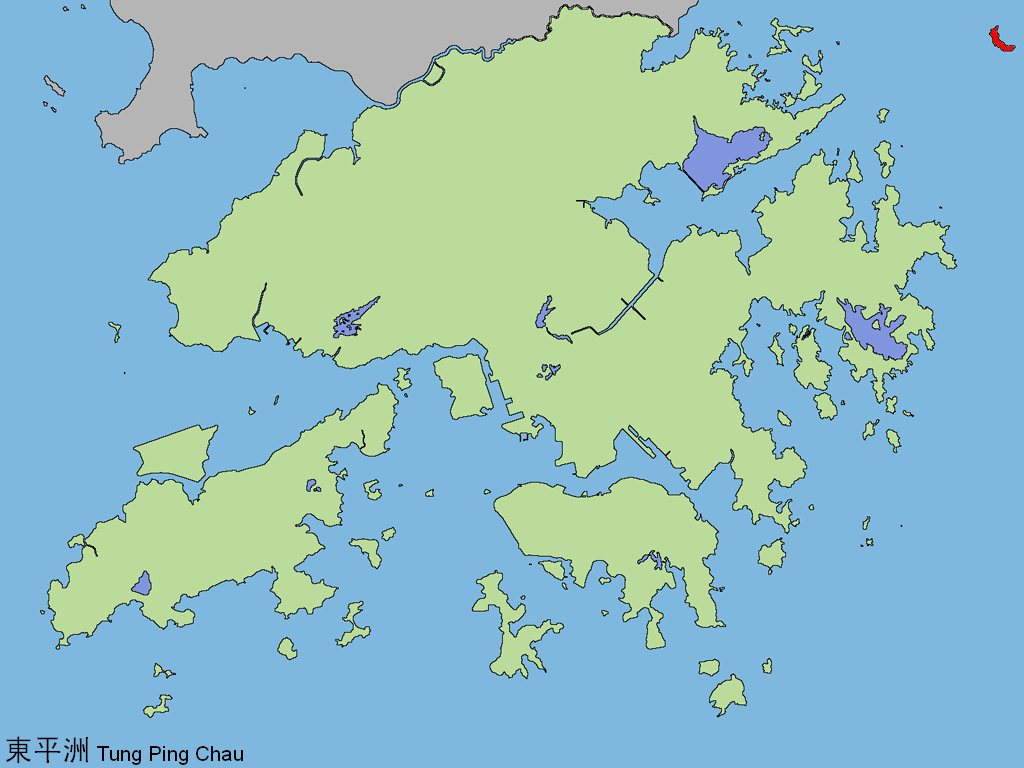 中文（香港）: 東平洲。